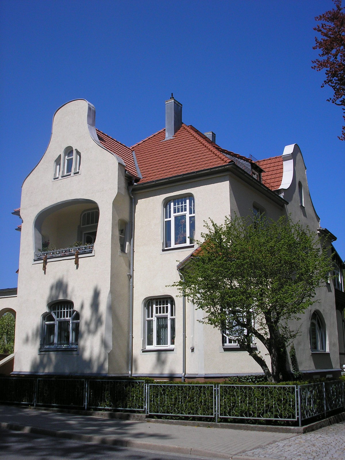 Eine Villa im Kurviertel von Ilmenau (Thüringen).